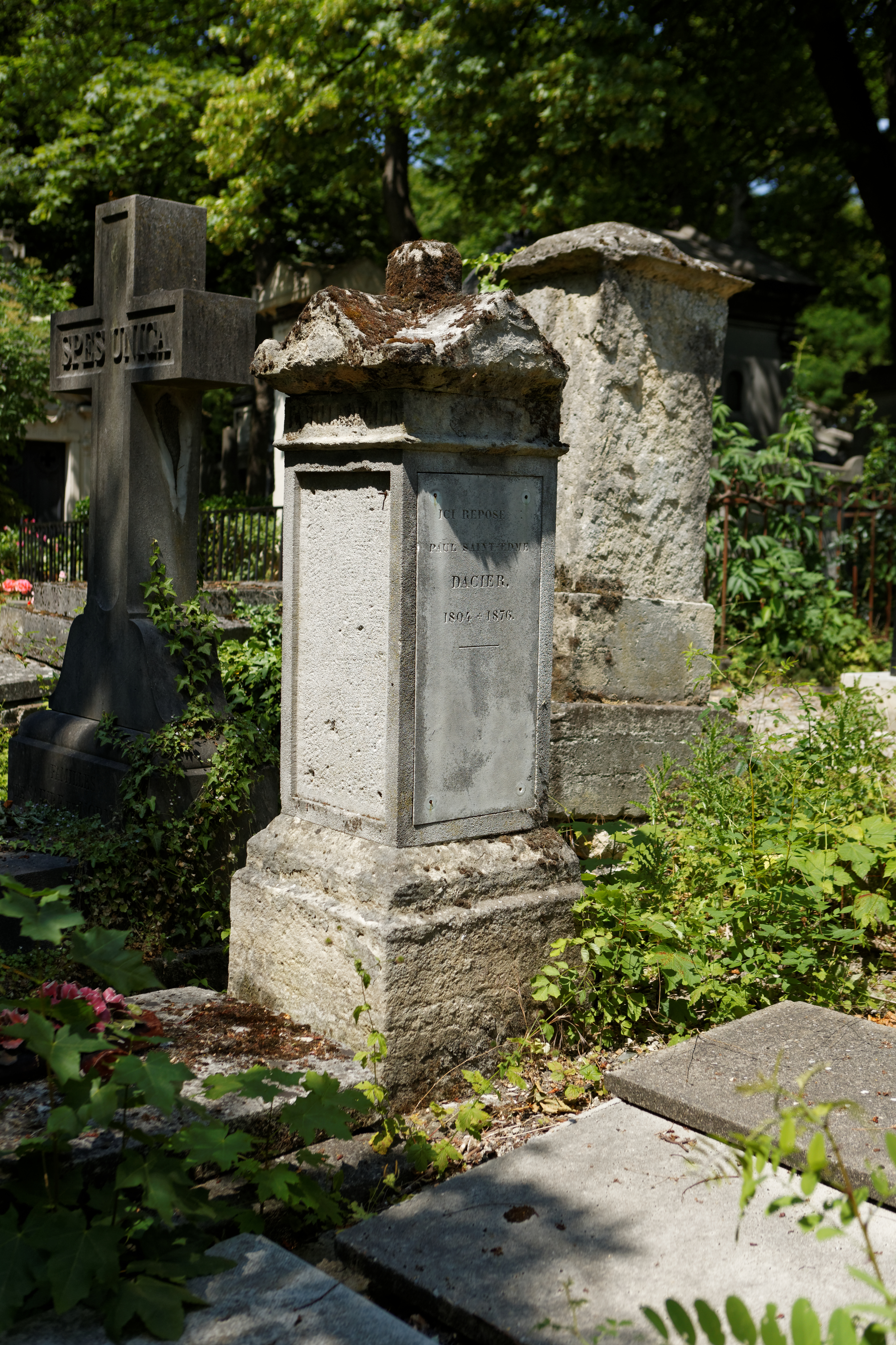 Sépulture de Bon-Joseph Dacier (1742-1833), historien, philologue, traducteur helléniste, conservateur français, président du Conservatoire de 1806 à 1829 ; Paul Saint-Edmé Dacier (1804-1876), employé à l'octroi de Paris et petit-fils de Bon-Joseph Dacier.